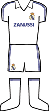 Uniforme del Real Madrid C.F. en 1982.